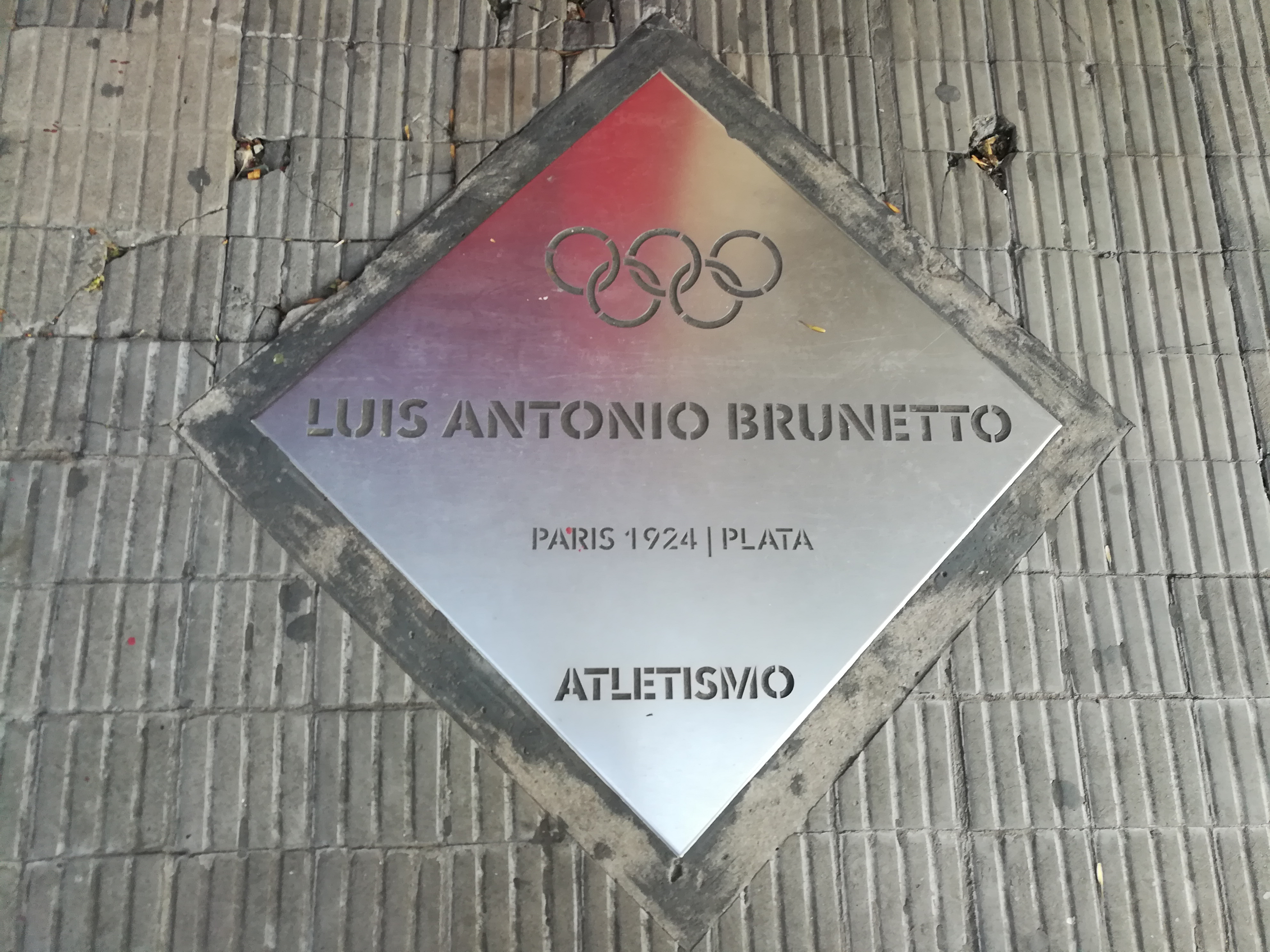 Paseo de los Olímpicos de los en la Avenida Pellegrini (Rosario).